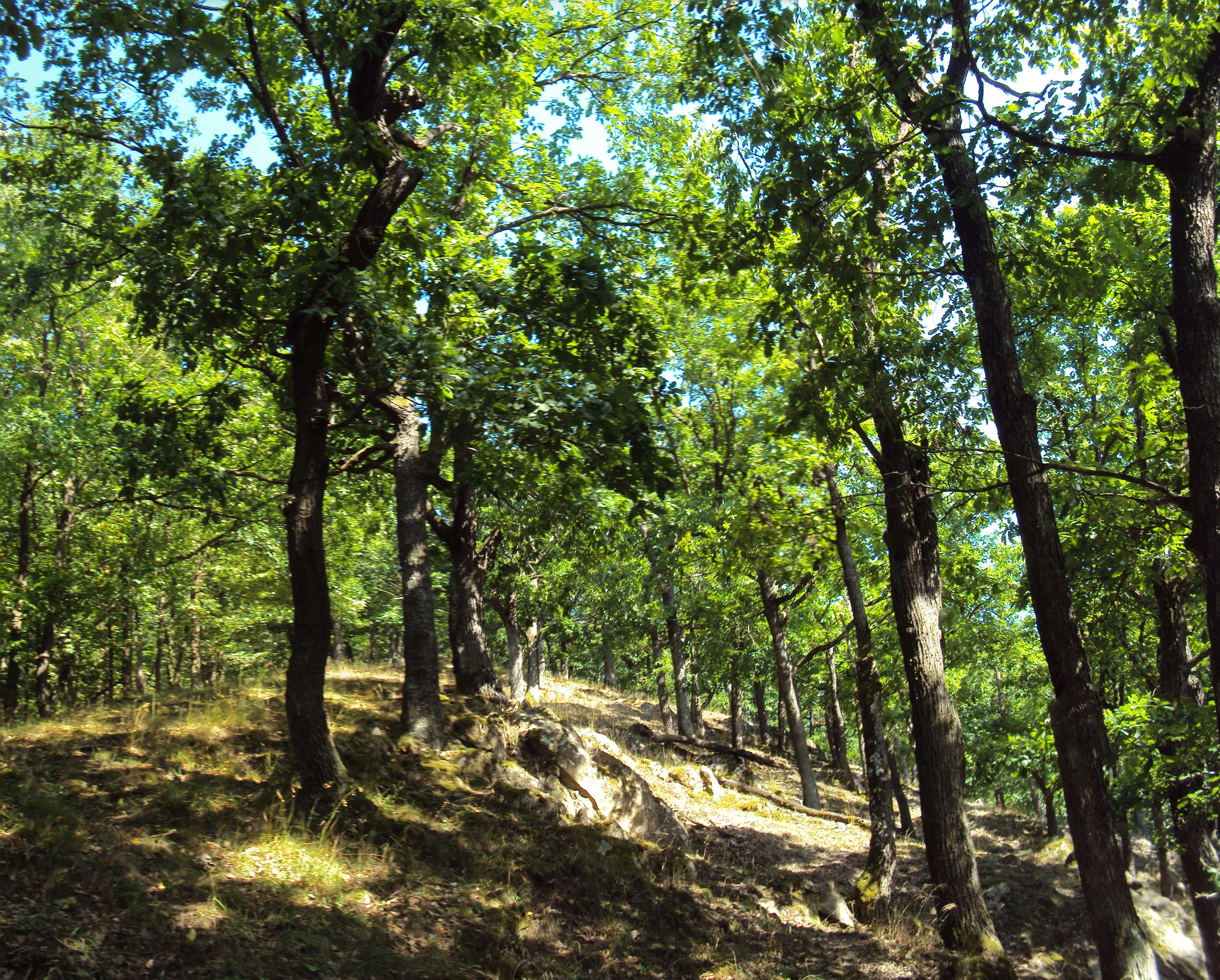 Místní likalita v Podkomorských lesích